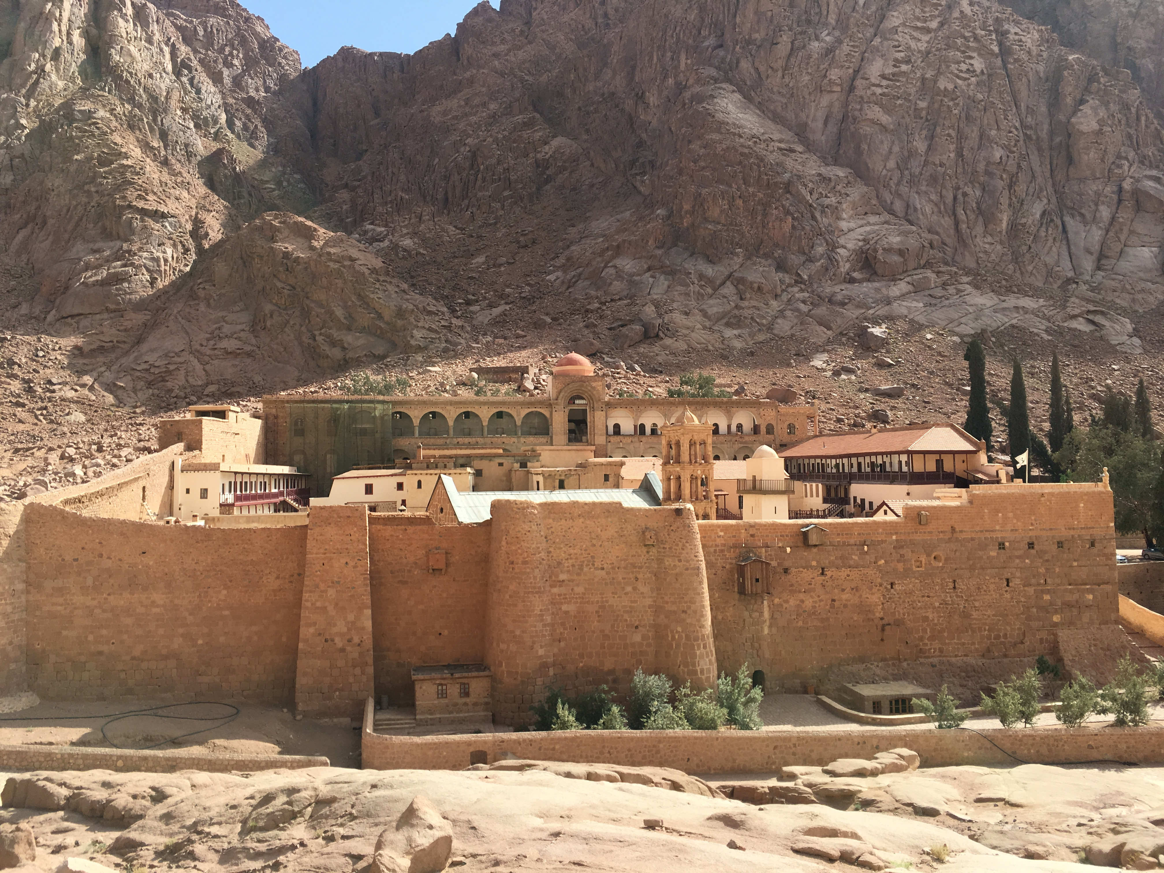 دير سانت كاترين ، تصوير حاتم مشير